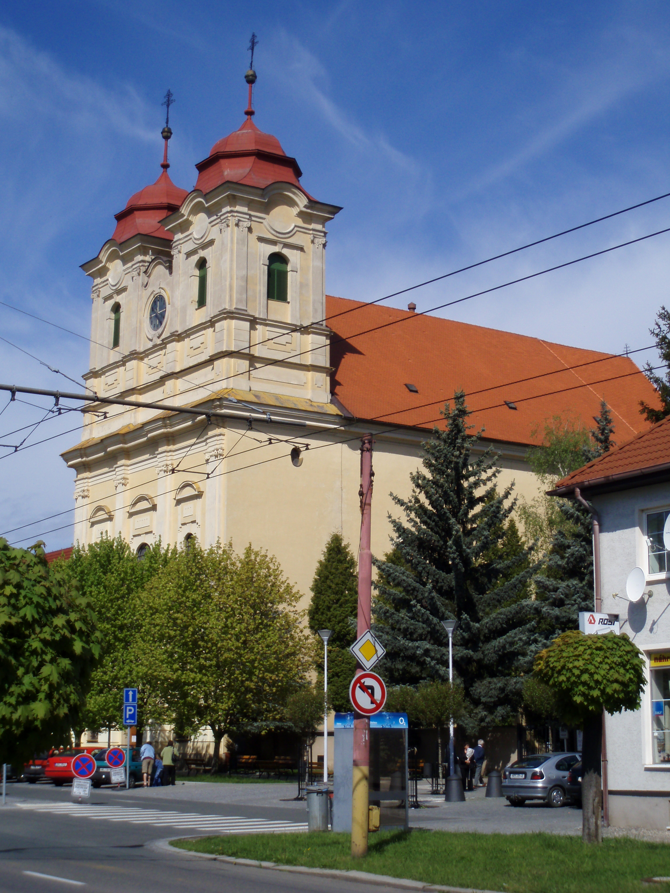 Kostel sv. Anny v Hradci Kralove-Kuklenach